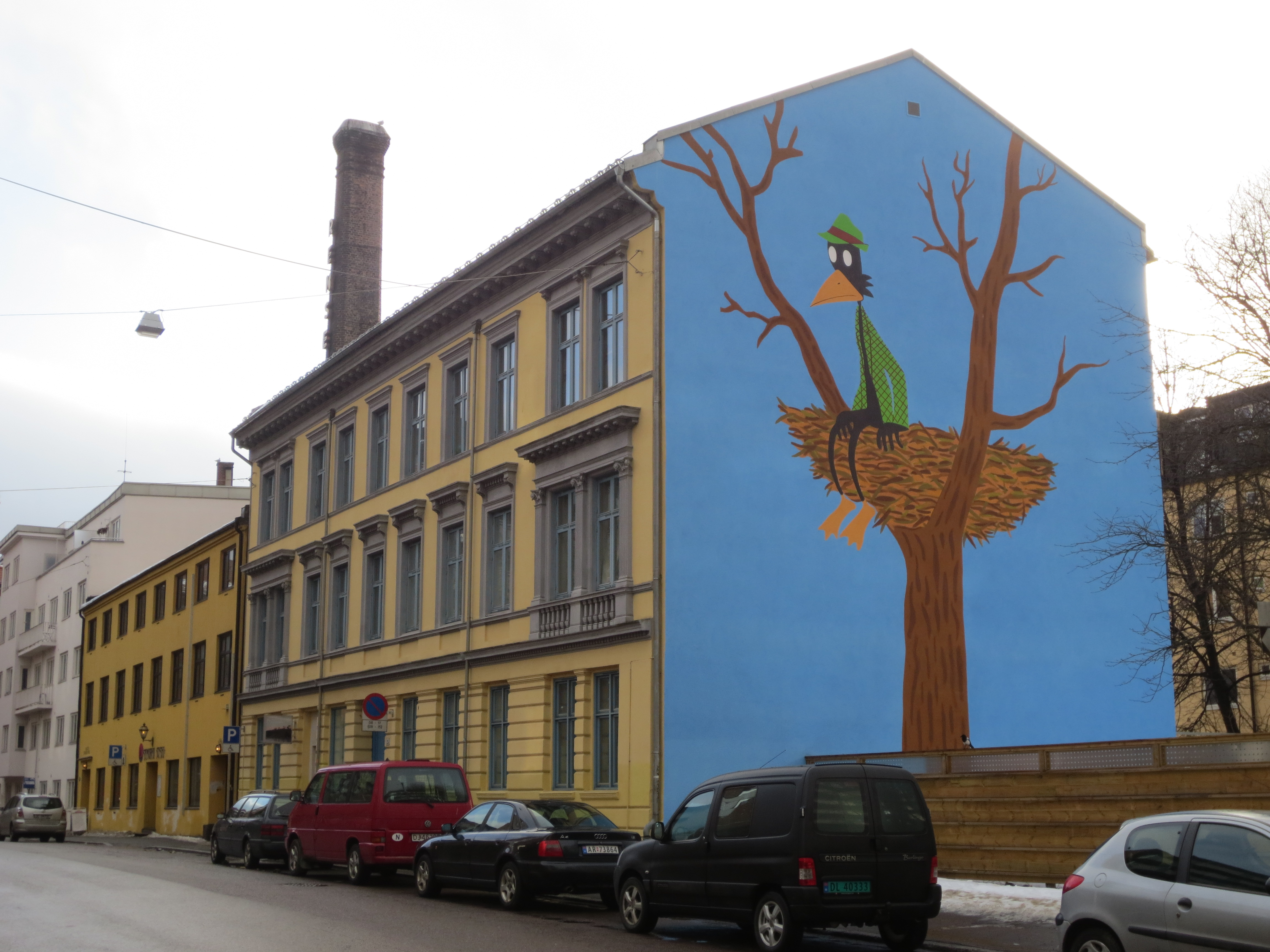 Kolstadgata 15 på Tøyen i Oslo